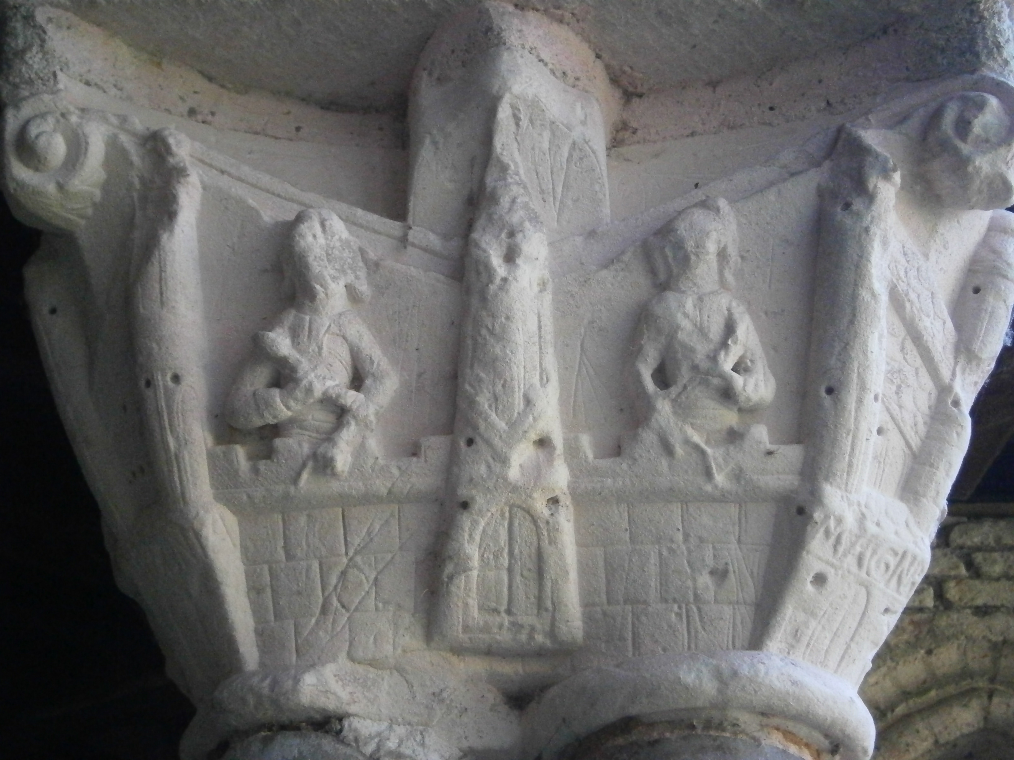 Chapiteau de Moissac : représentation de "Babylone la Grande". Inscription latine "BABILONIA MAGNA". Galerie Sud. Vers 1100. La ville est représenté comme une cité médiévale fortifiée, avec des murailles et hautes tours, des personnages sont figurés sur le chemin de ronde. Ce chapiteau est disposé à l'opposé de celui représentant Jérusalem, opposition entre la cité des péchés et la cité sainte